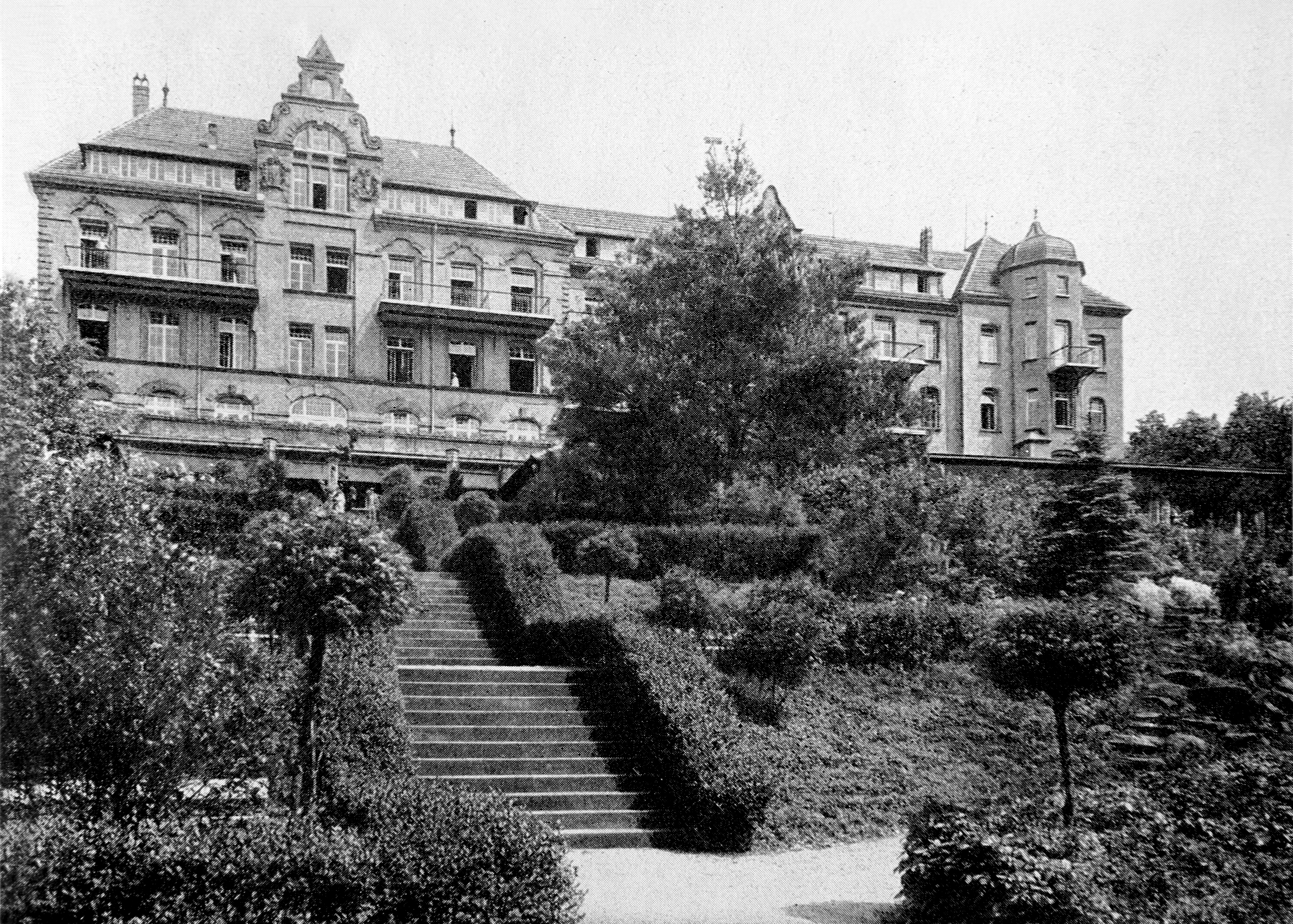 Historische Aufnahme der Fachklinik Eußerthal